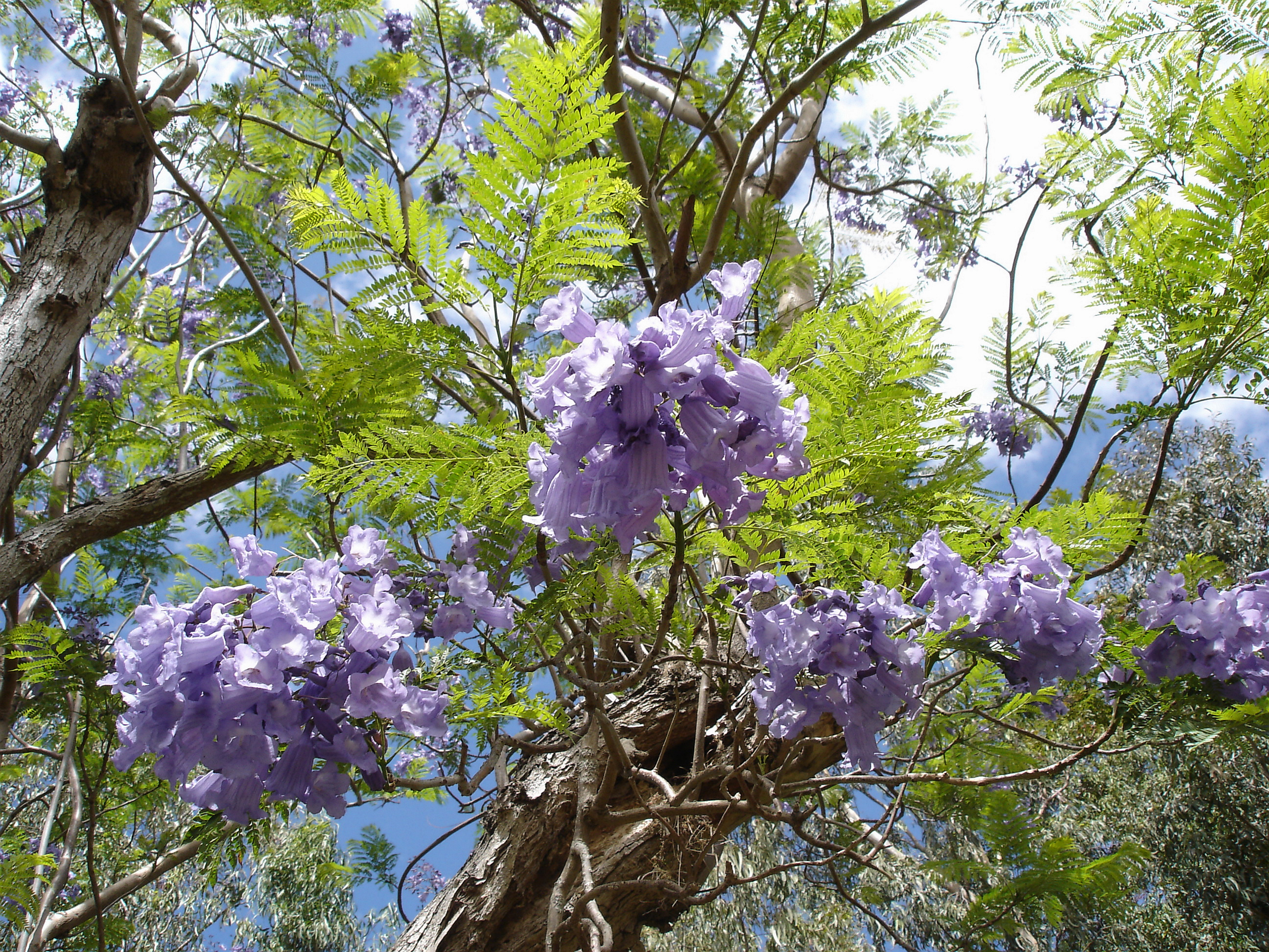 Description: Jacaranda mimosifolia, novembre 2004, Conservatoire botanique de Mascarin, La Réunion Source: Bouba